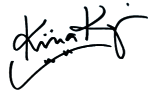 Автограф Кийры Корпи.